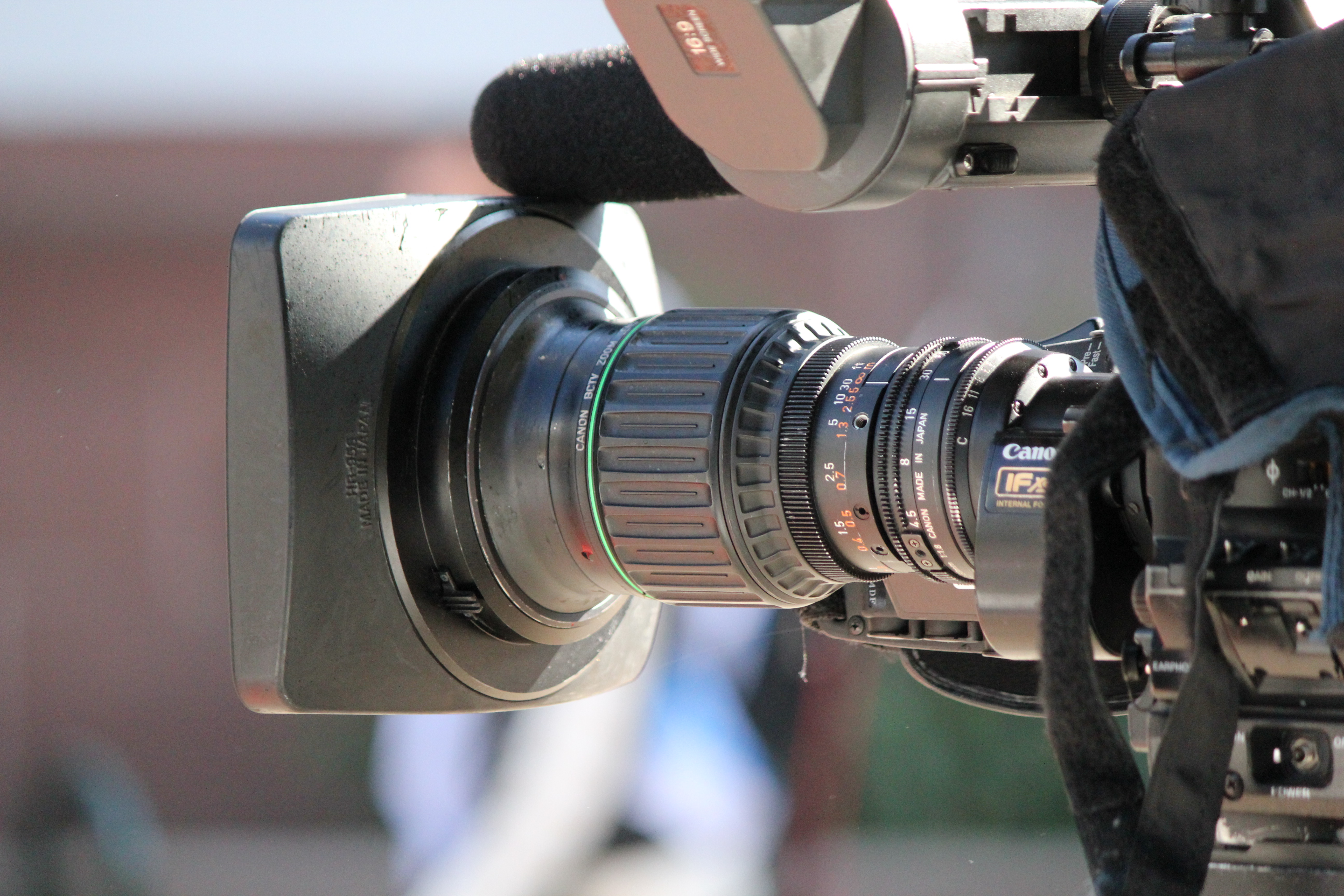 Caméra d'un reporter lors du rallye de France 2010.